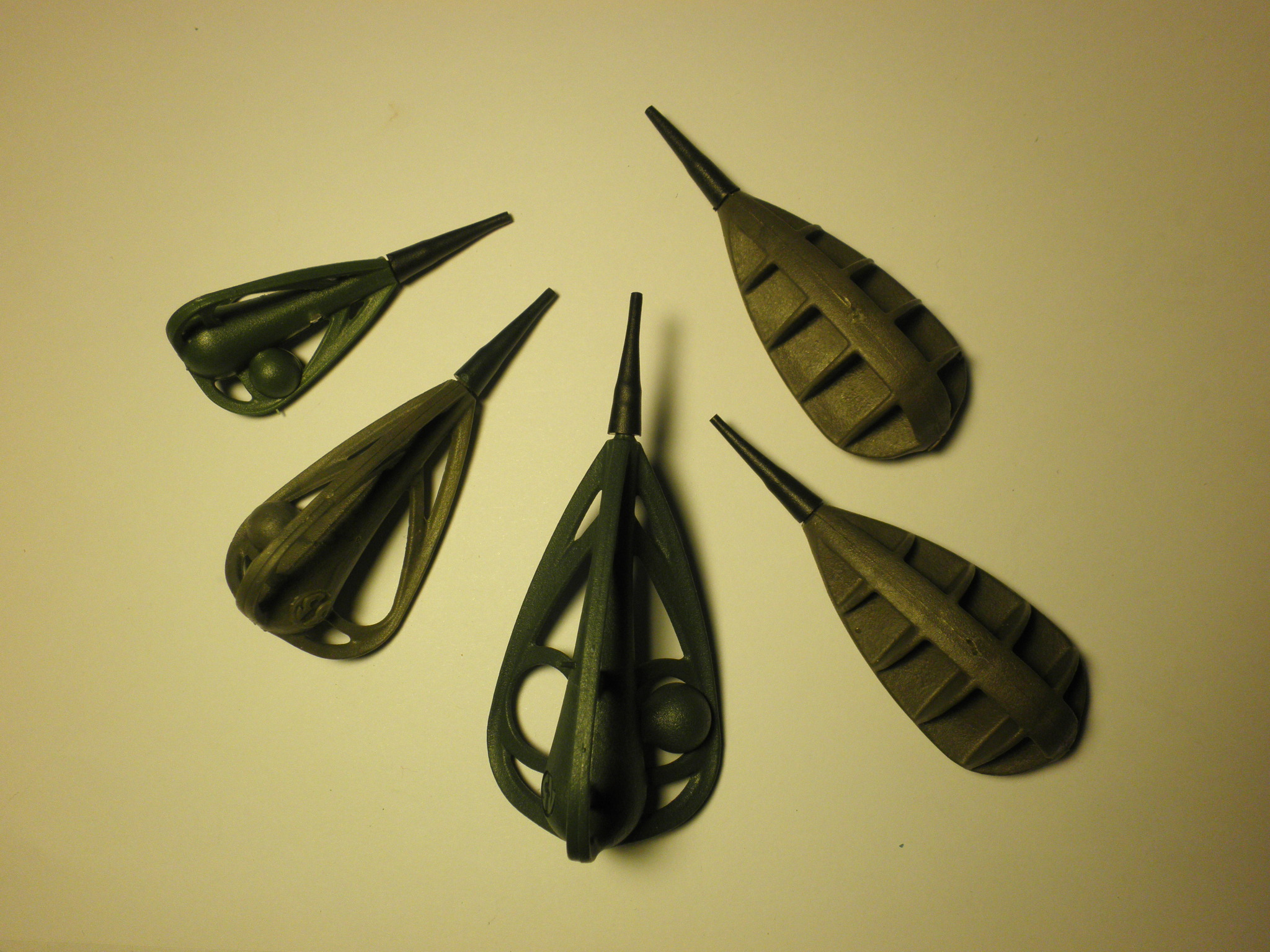 Виды методных кормушек